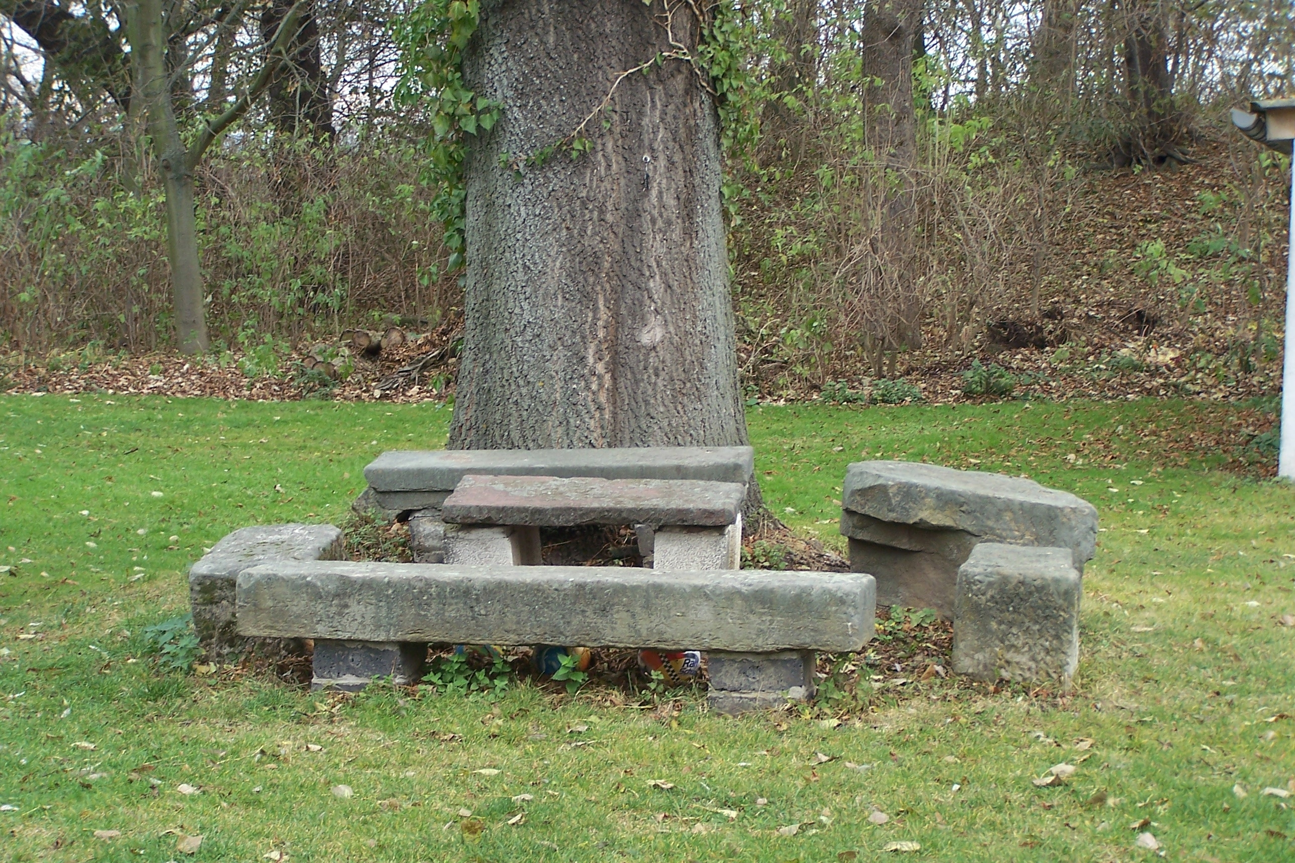 Kindleben